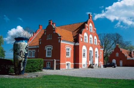 Danmarks Keramikmuseum - Grimmerhus i Middelfart. Til venstre kæmpekrukke af Peter Brandes.